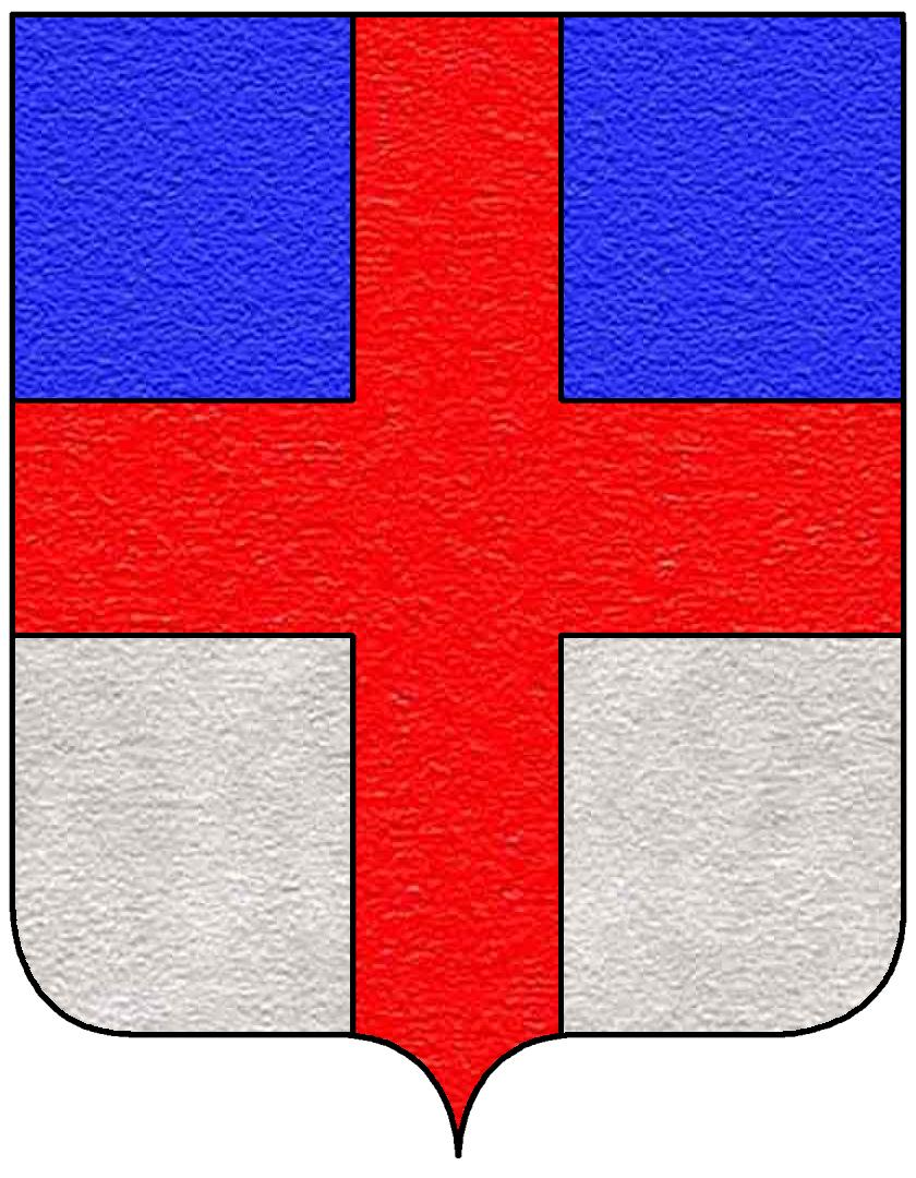 Stemma della famiglia Barbalini